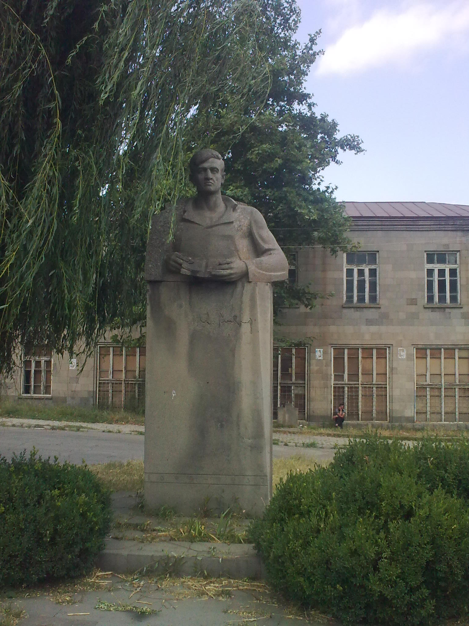 Ակսել Բակունցի հուշարձան, Գորիս 3/131